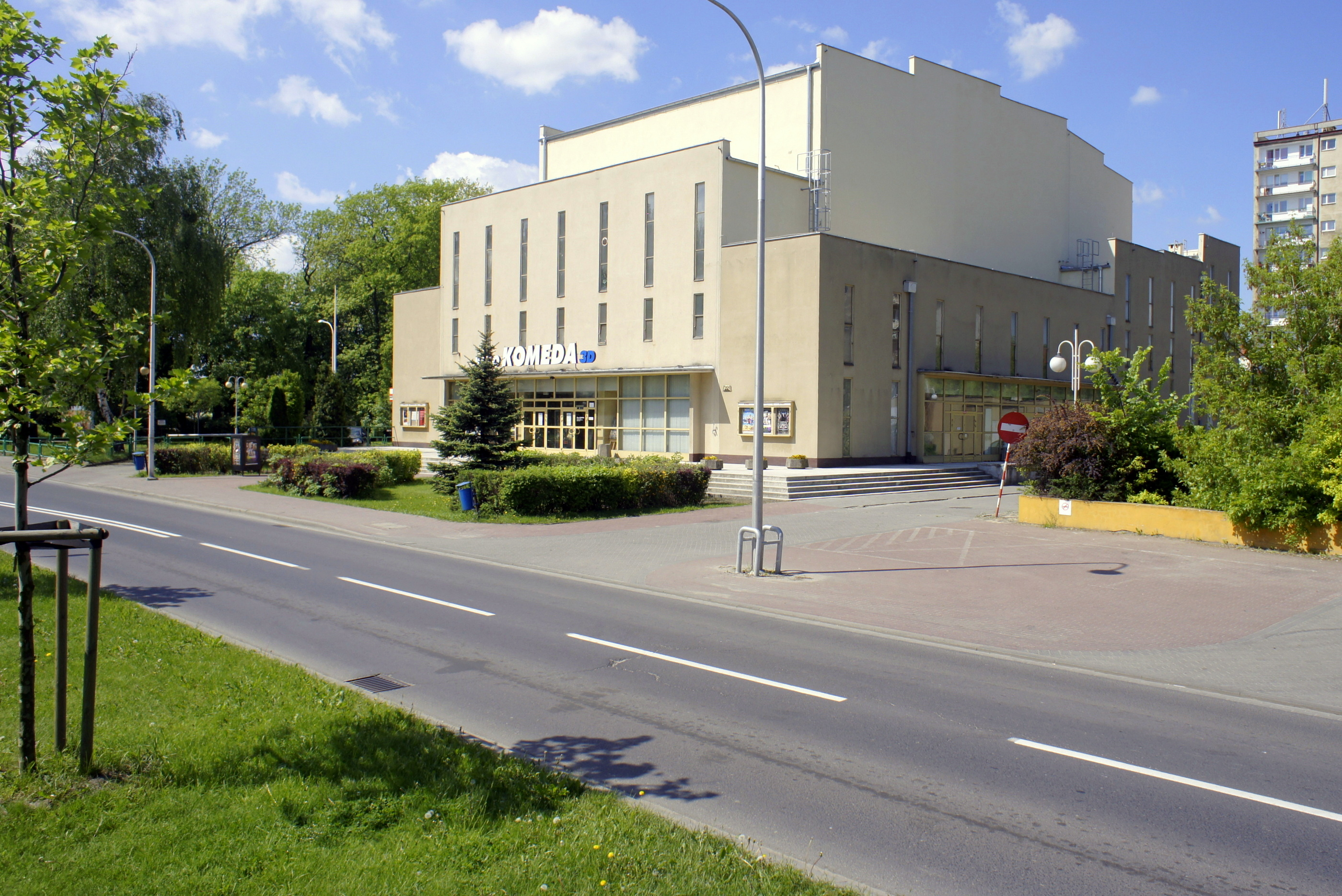 Kino Komeda w Ostrowie Wlkp. w alei Powstańców Wielkopolskich 22. Kino zostało nazwane na cześć Krzysztofa Komedy – Trzcińskiego, wybitnego polskiego kompozytora i pianisty jazzowego, którego fascynacja muzyką jazzową rozpoczęła się w Ostrowie Wlkp.